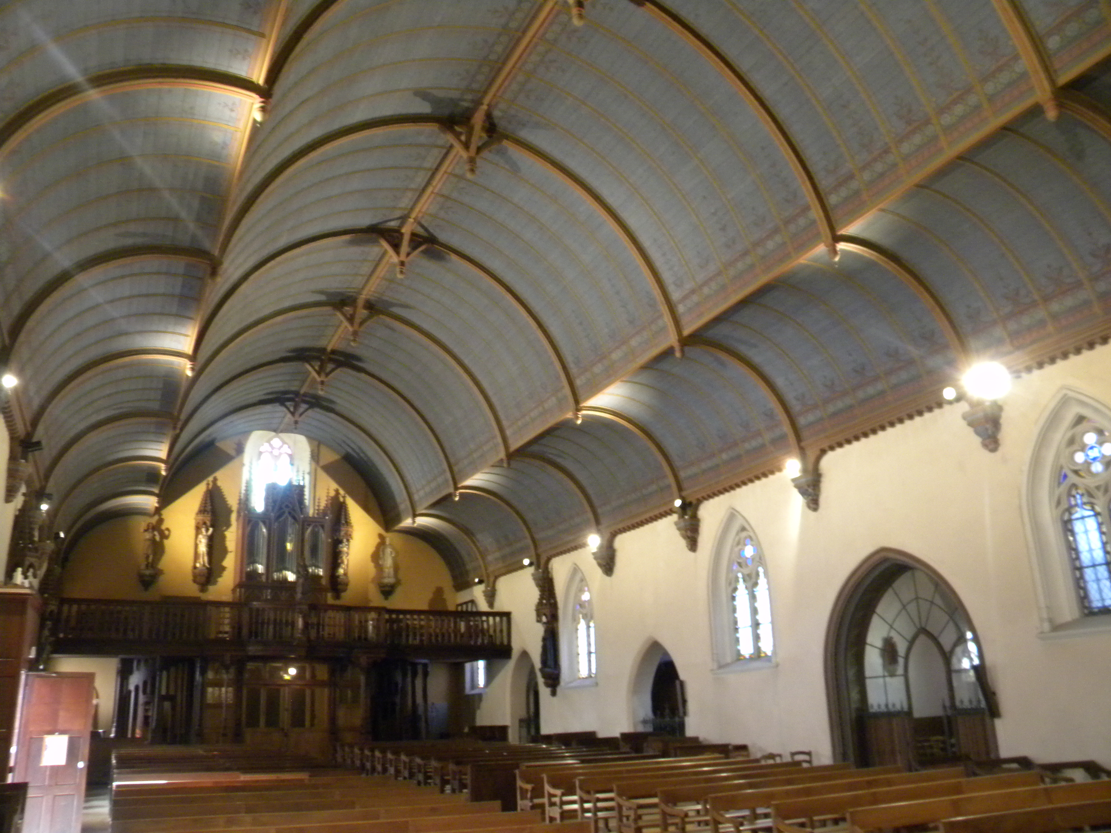 Kirko sankta Laurent